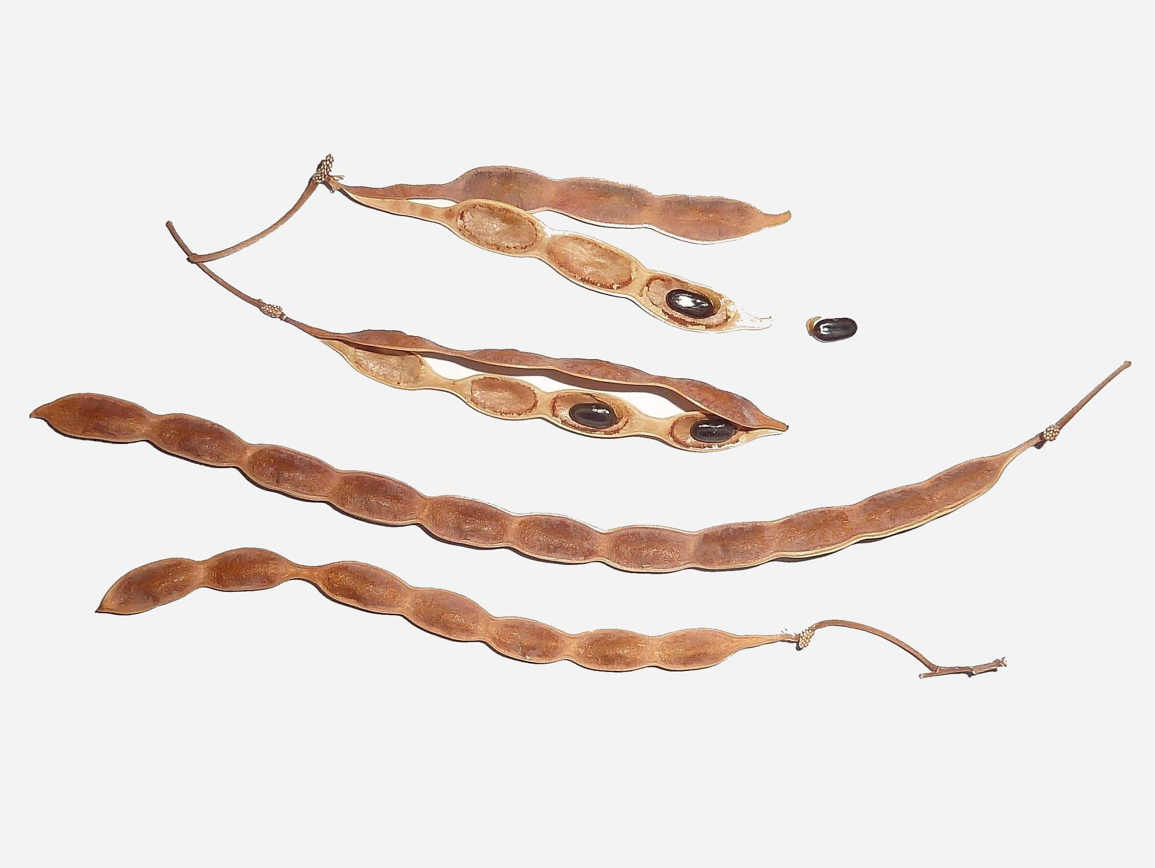 Acacia saligna - Legumbres; con unas abiertas con las simientes in situ; una simiente suelta. - Cultivada-ornamental, Centro de Salud Norte, Águilas (Murcia, España).